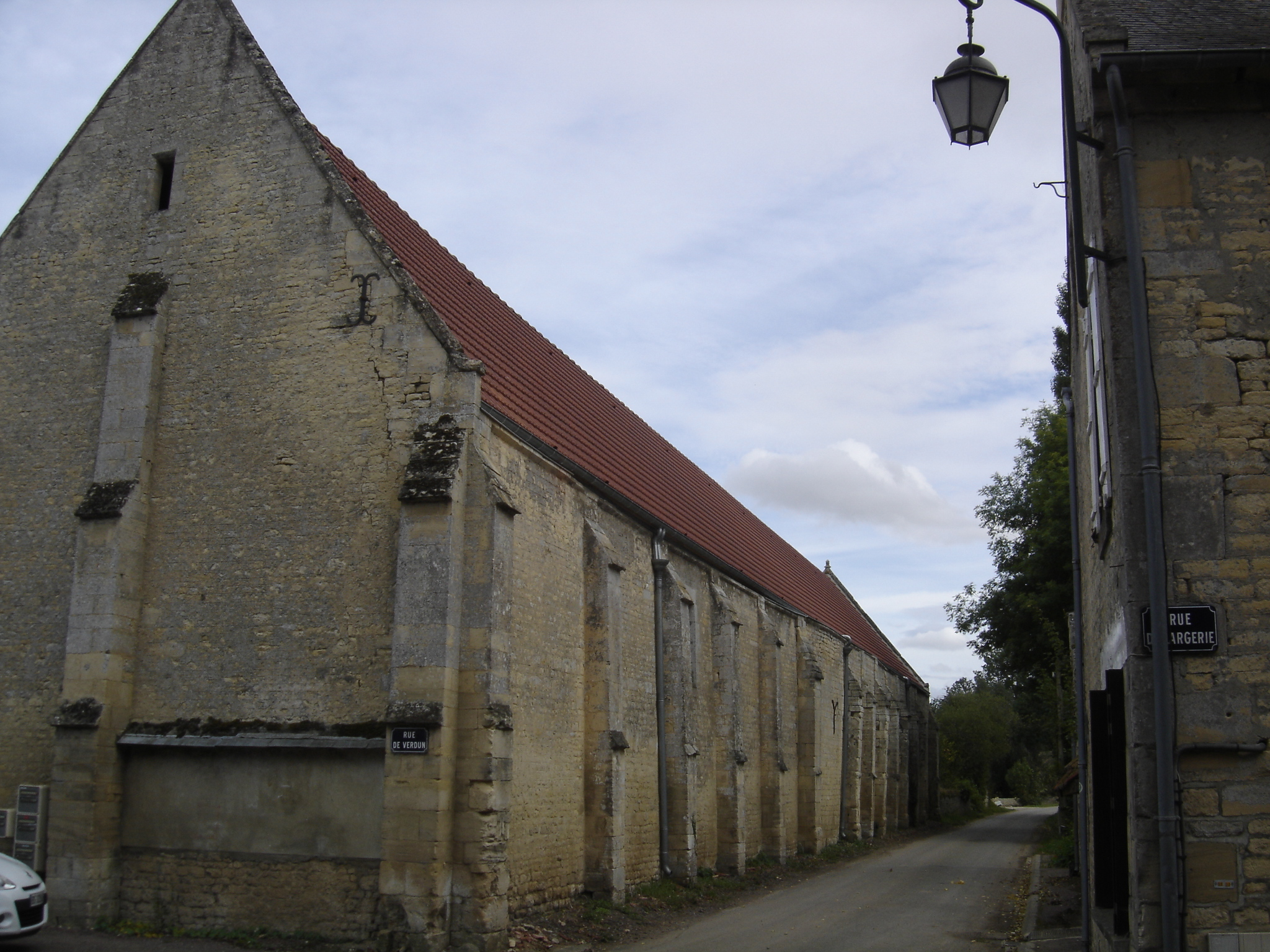 grange aux dîmes du Manoir de Cully